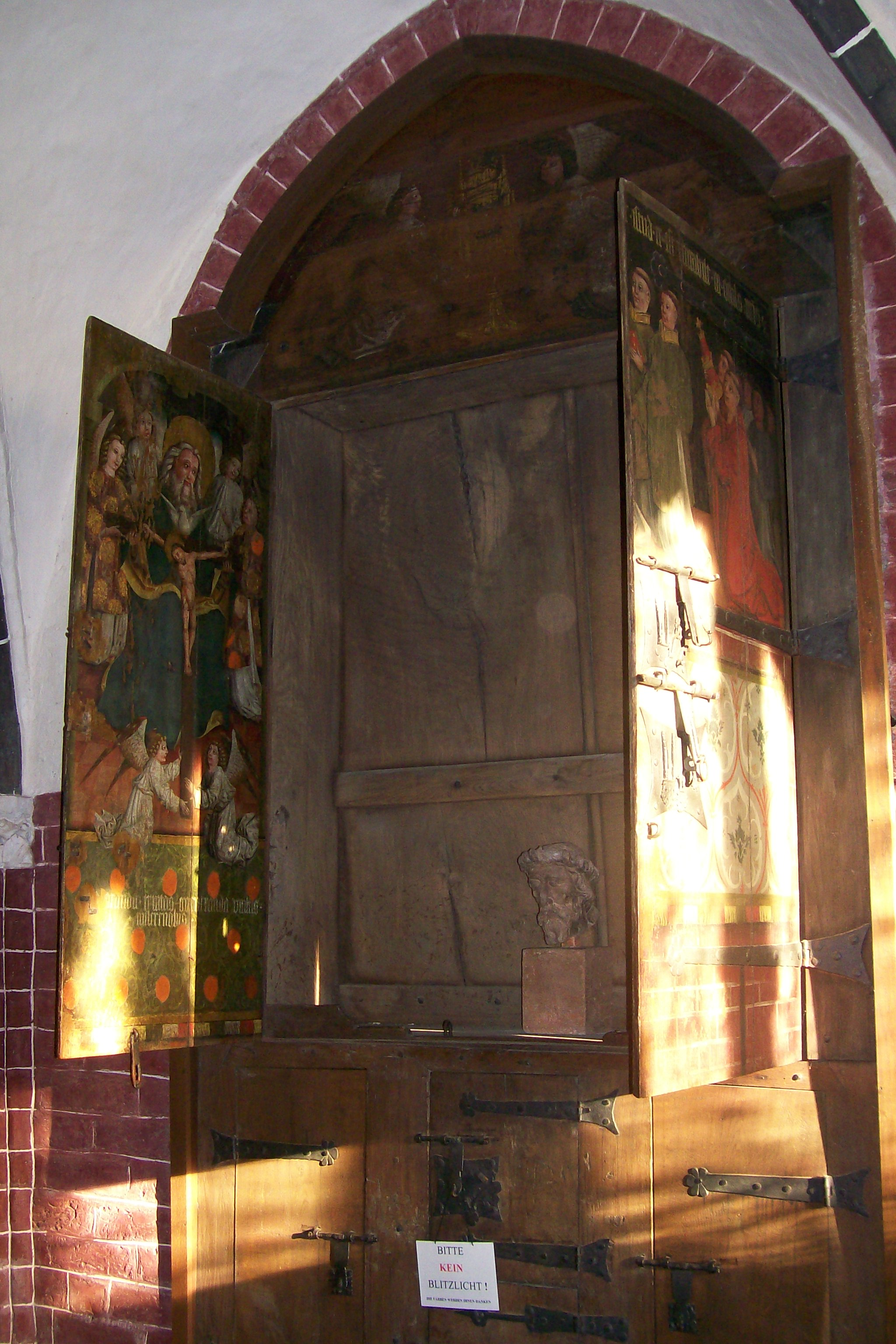 Wunderblutkirche Bad Wilsnack (Wunderblutkirche (Bad Wilsnack), Wunderblutschrein aus der Mitte des 15. Jahrhunderts